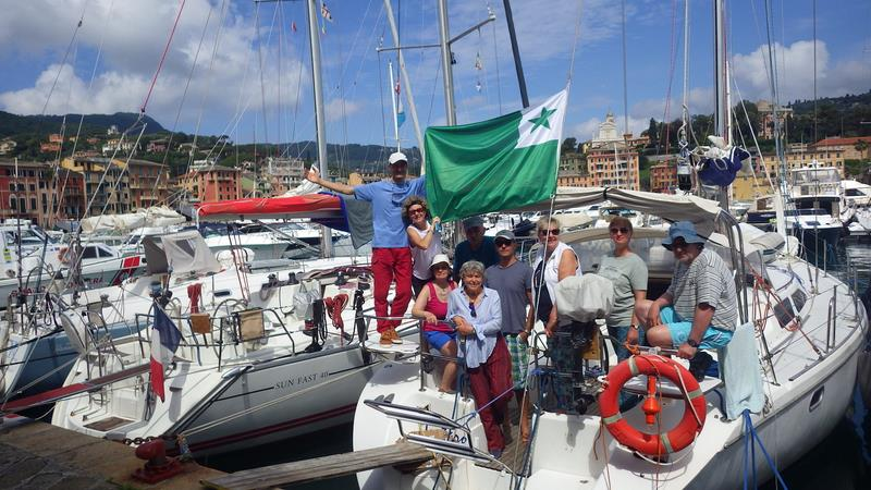 velekskurso organizita de Grupo Esperanto Tigulio